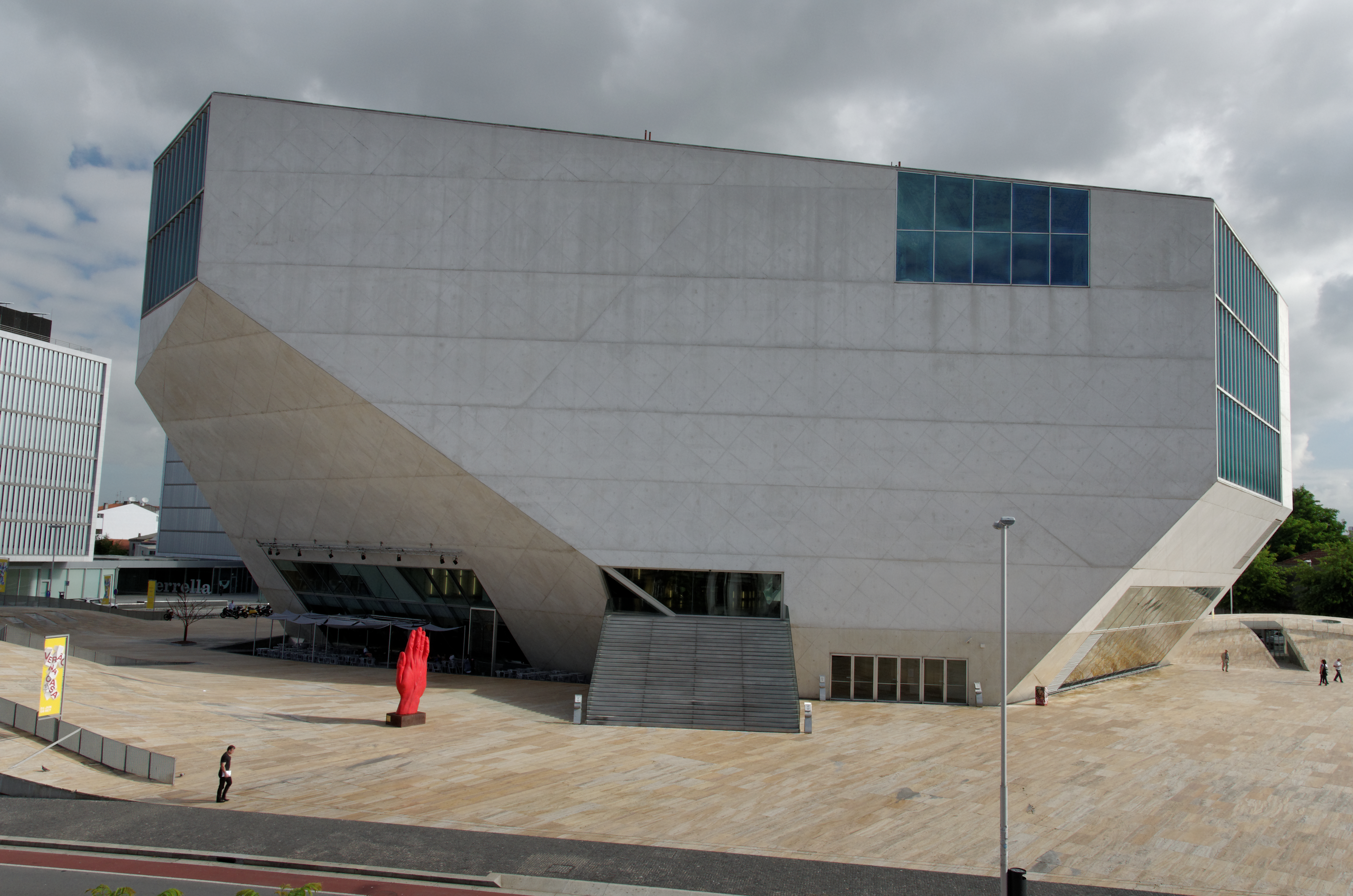 Casa da Música de Porto vu depuis la façade de l'entrée principale